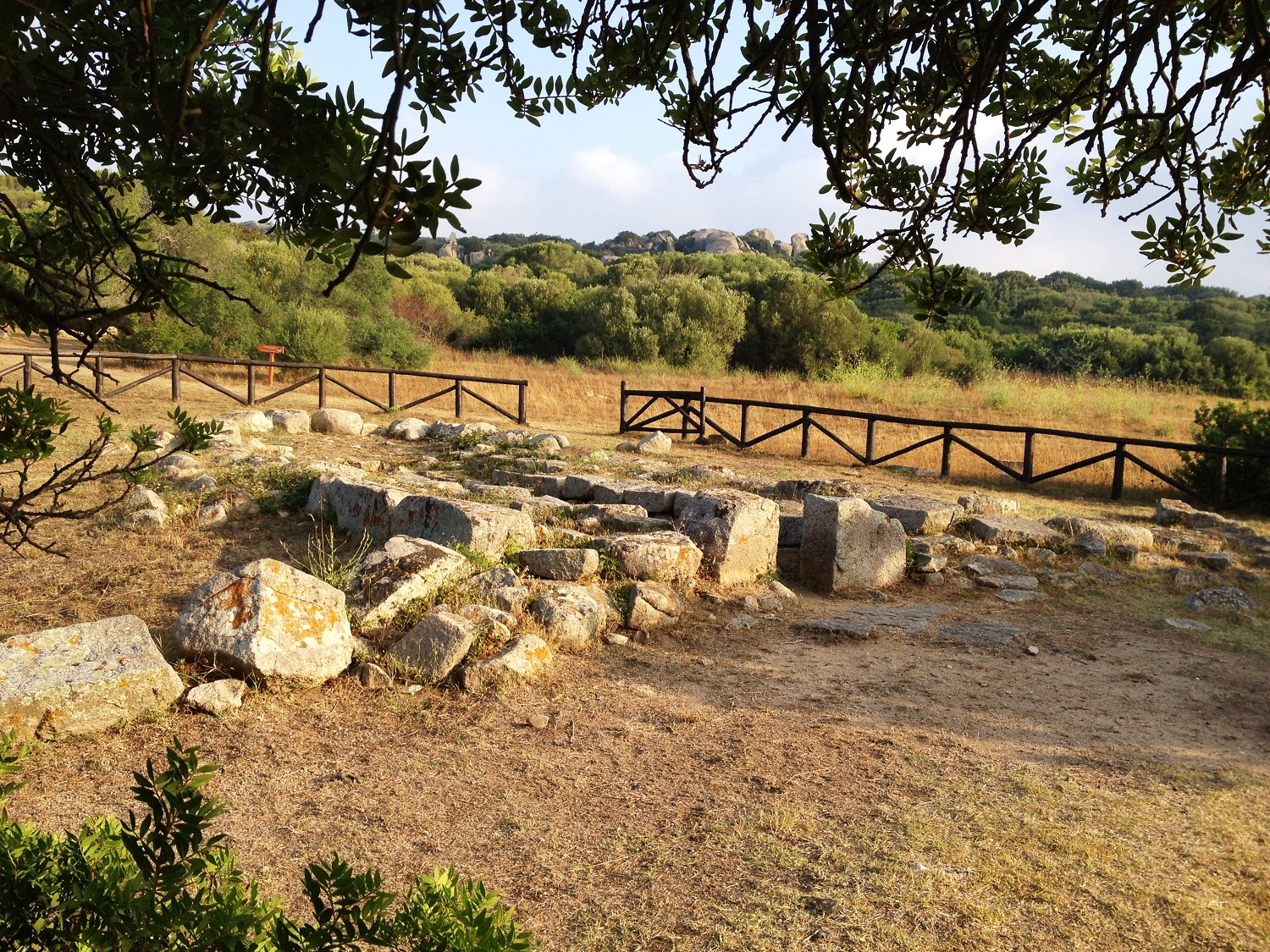 Nuraghe Lu Brandali This is a photo of a monument which is part of cultural heritage of Italy.